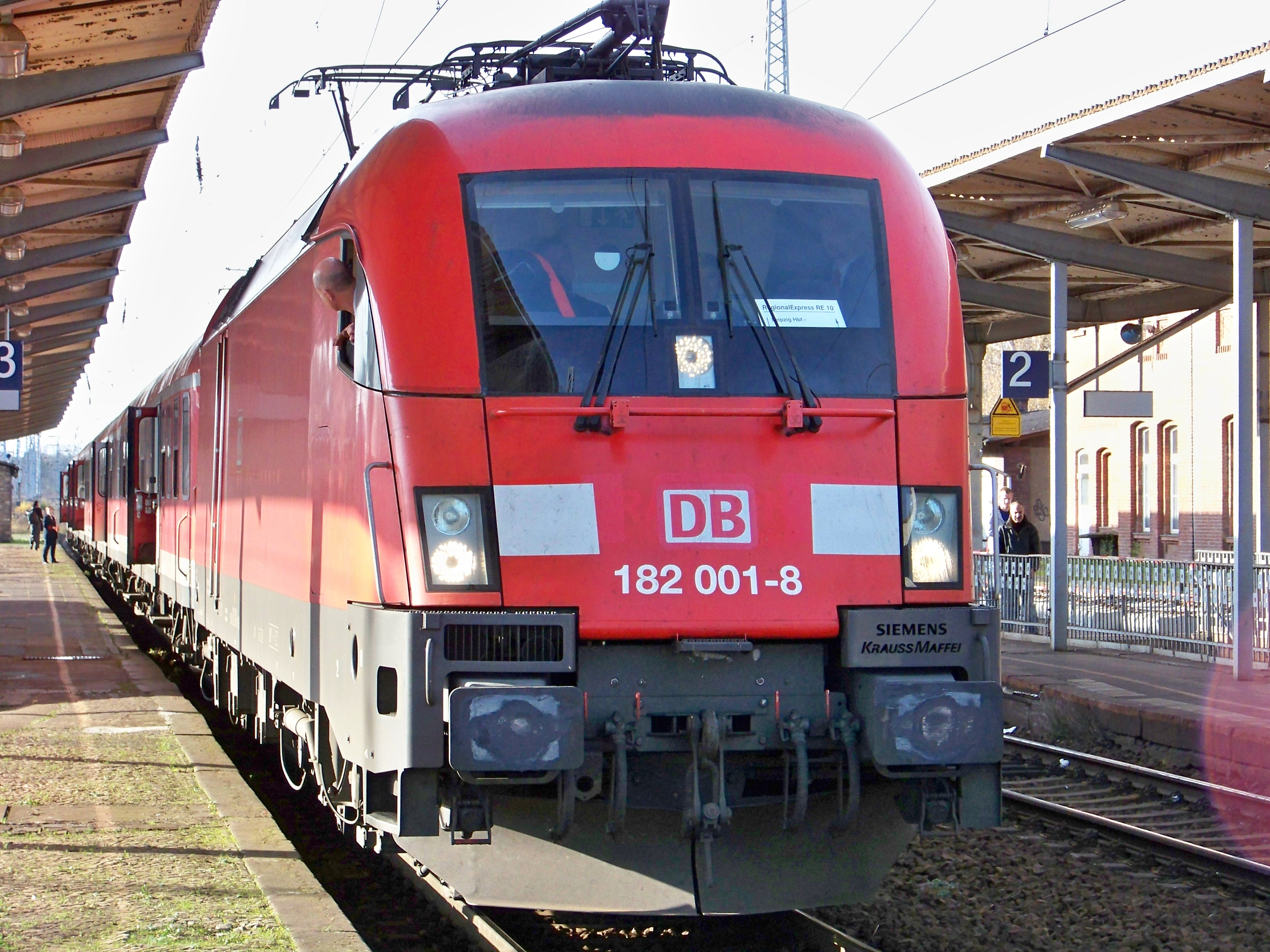 1DB 182 001 mit RE-Linie 10 im Bahnhof Eilenburg